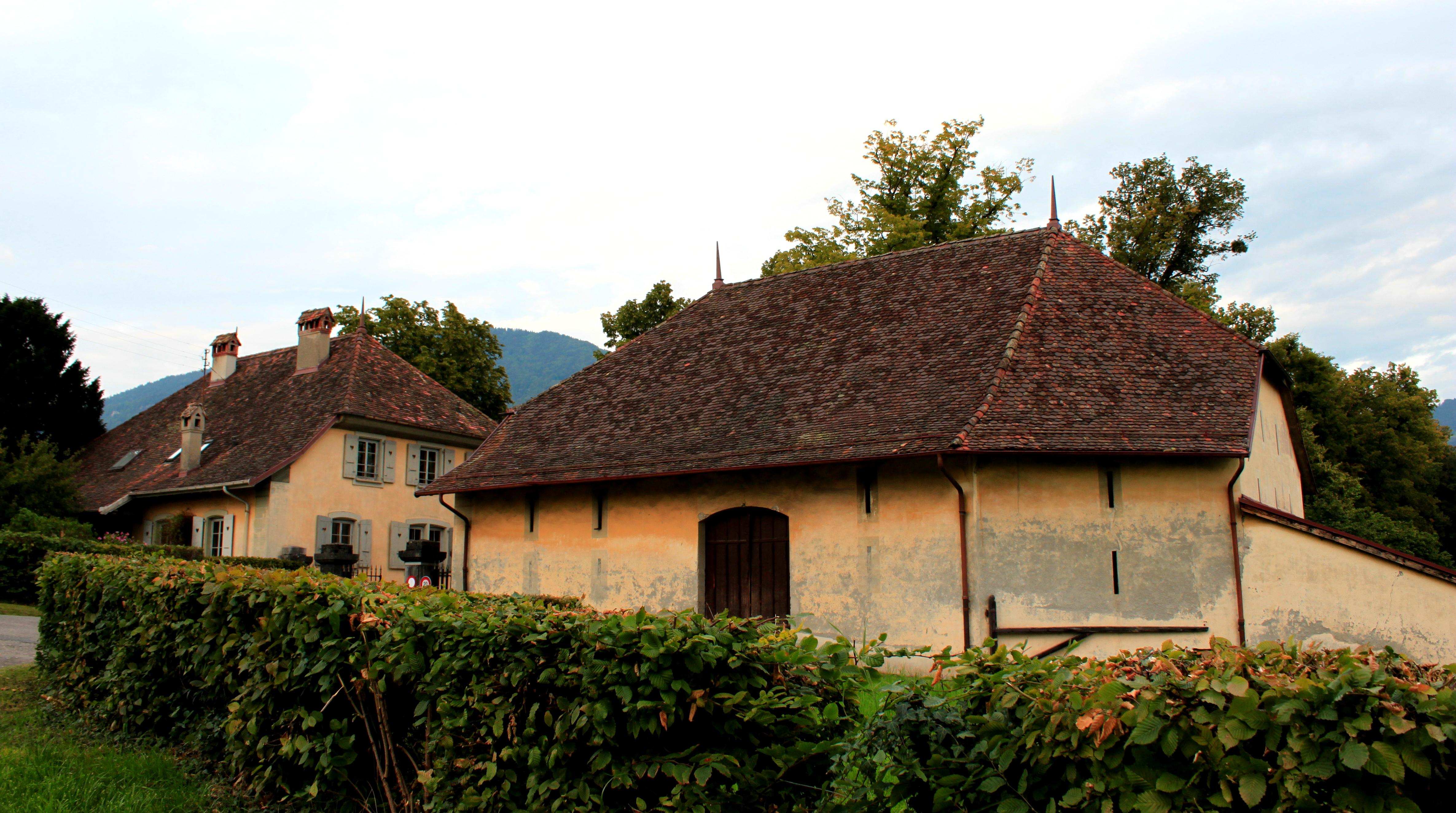 Suisse, canton de Vaud, Saint-Légier-La Chiésaz, Château d'Hauteville.